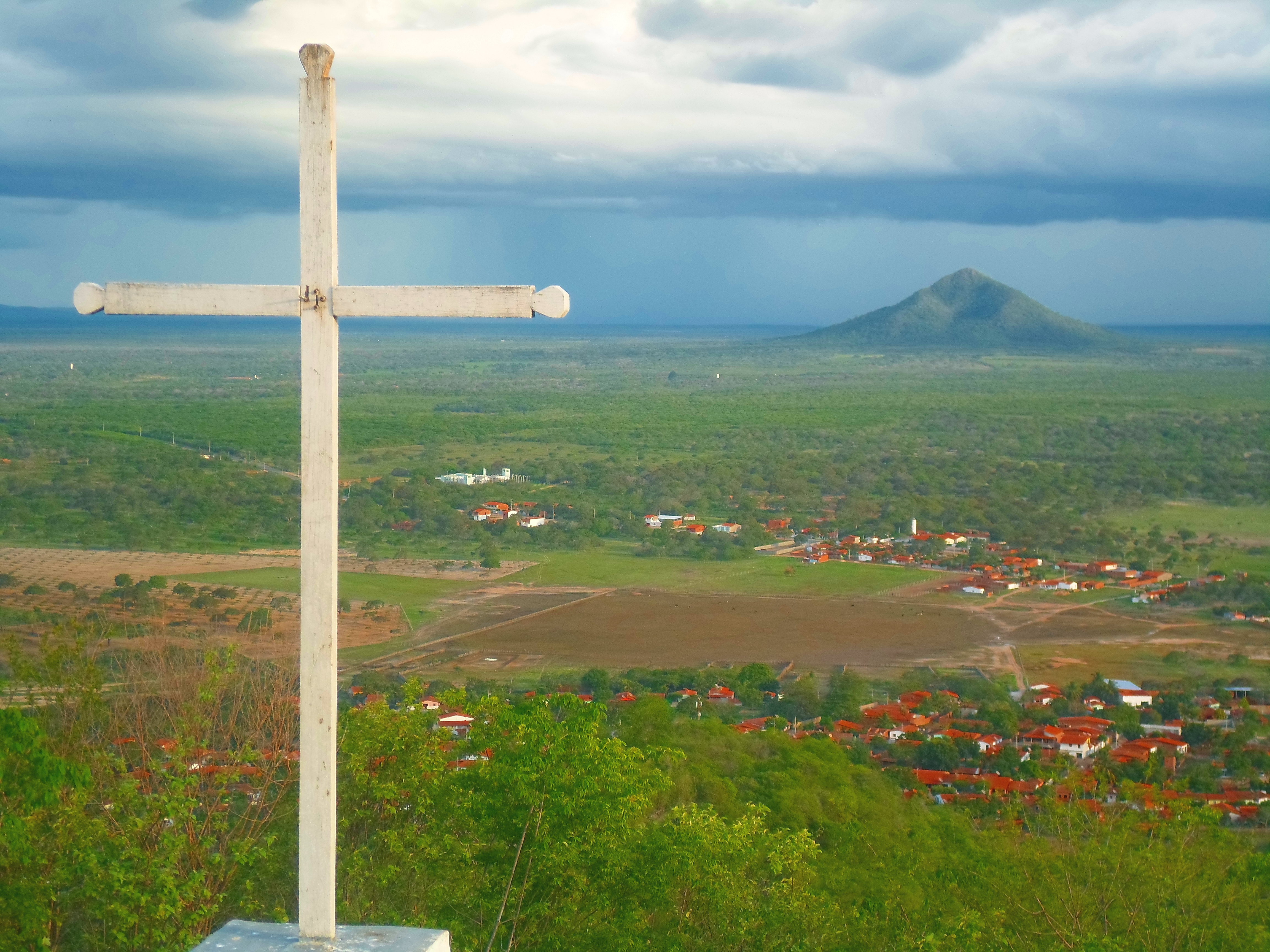 Vista do topo do Serrote de Ocara.